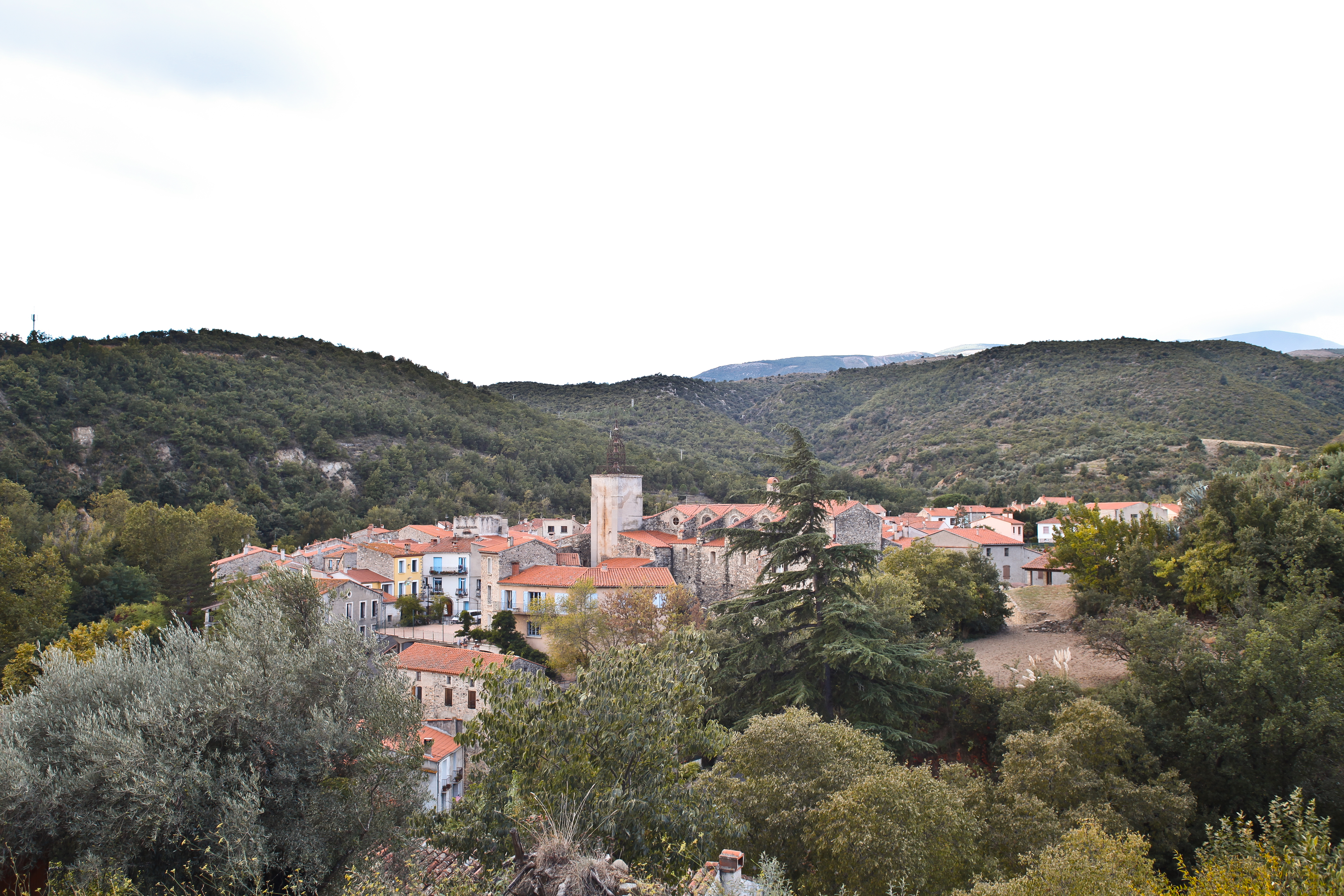 Village de Catllar, France